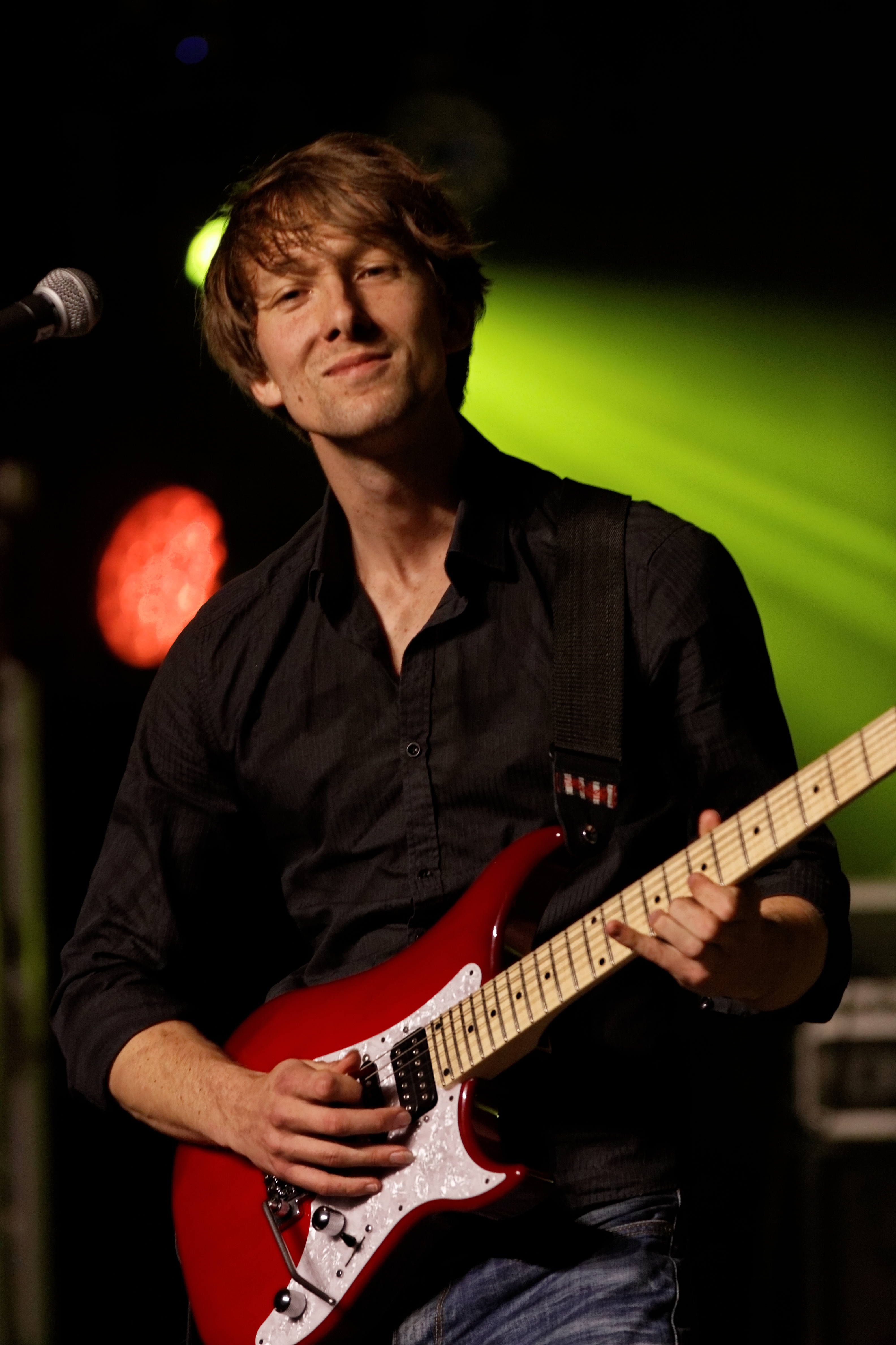 Julien Jaffres en concert à l'espace évêché lors du festival de Cornouaille 2012.